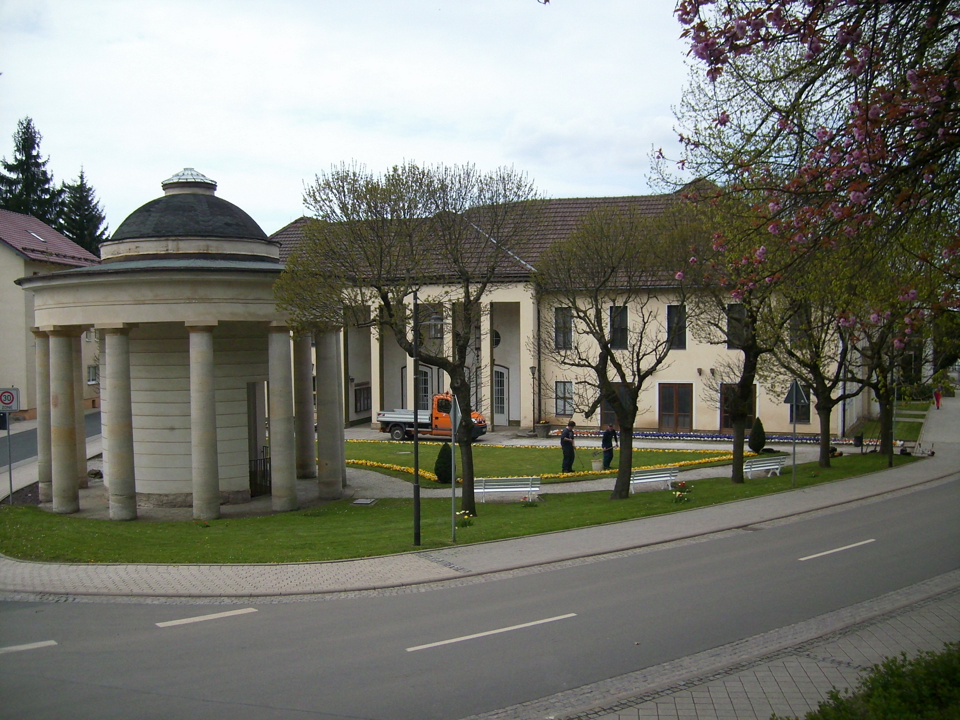 Theater und Brunnentempel Bad Liebenstein